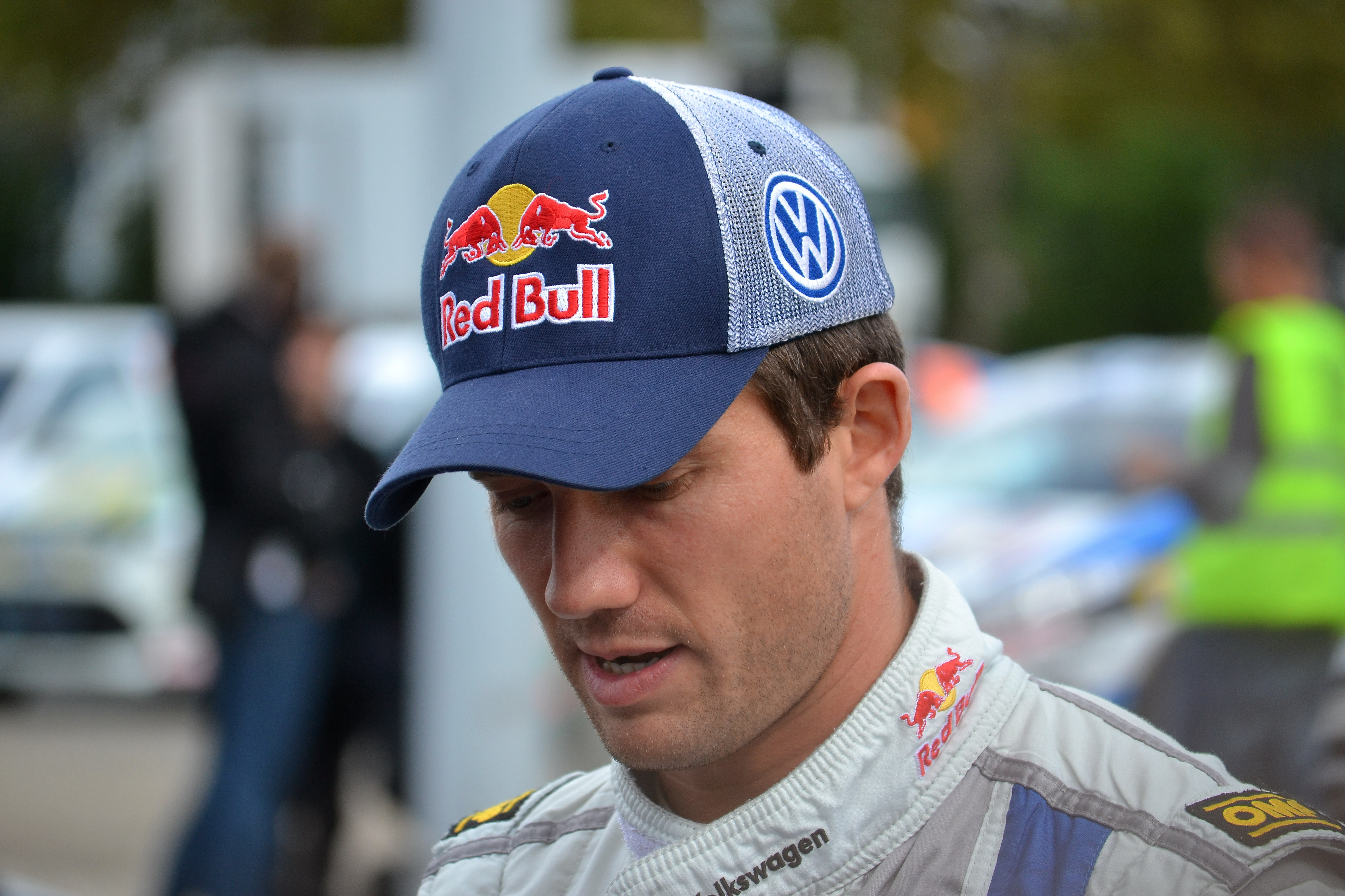 Sébastien Ogier au parc d'assistance de Colmar durant le Rallye de France-Alsace 2013.